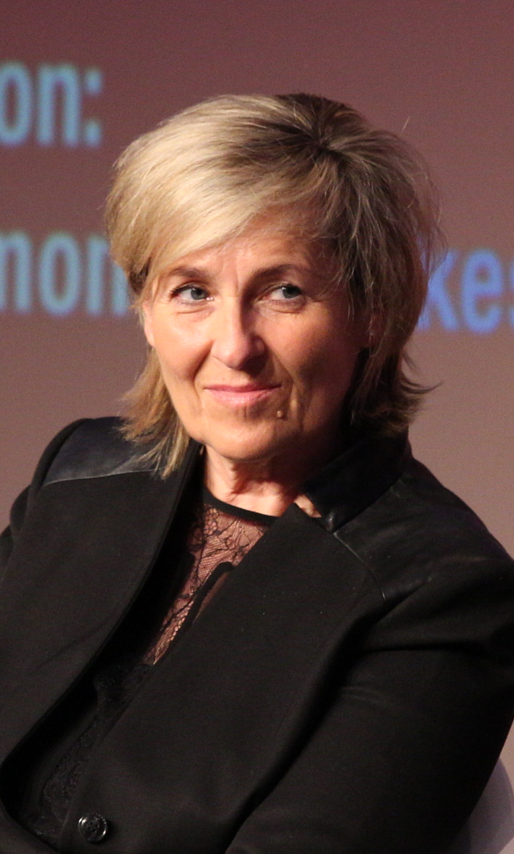 Karola Wille (Intendantin des MDR) auf der re:publica 17